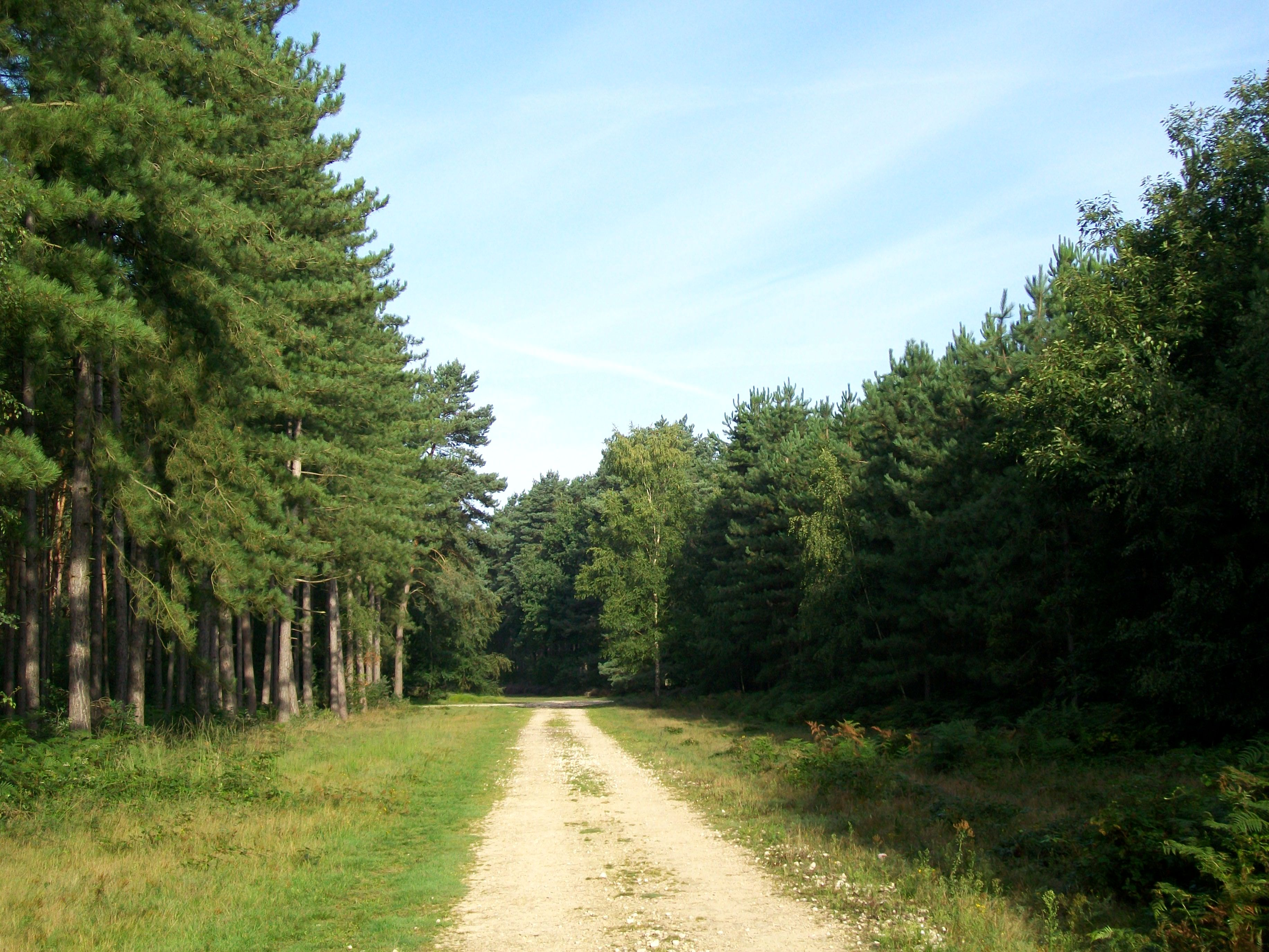 Le chemin de la Mare des Eaux à l'ouest d'Ermenonville ; c'est l'unique itinéraire de randonnée permettant de rejoindre le centre d'Ermenonville depuis l'ouest sans marcher sur la plate-bande de la RN 330 entre le rond-point et l'entrée du village (comme le fait le diverticule du GR 1).